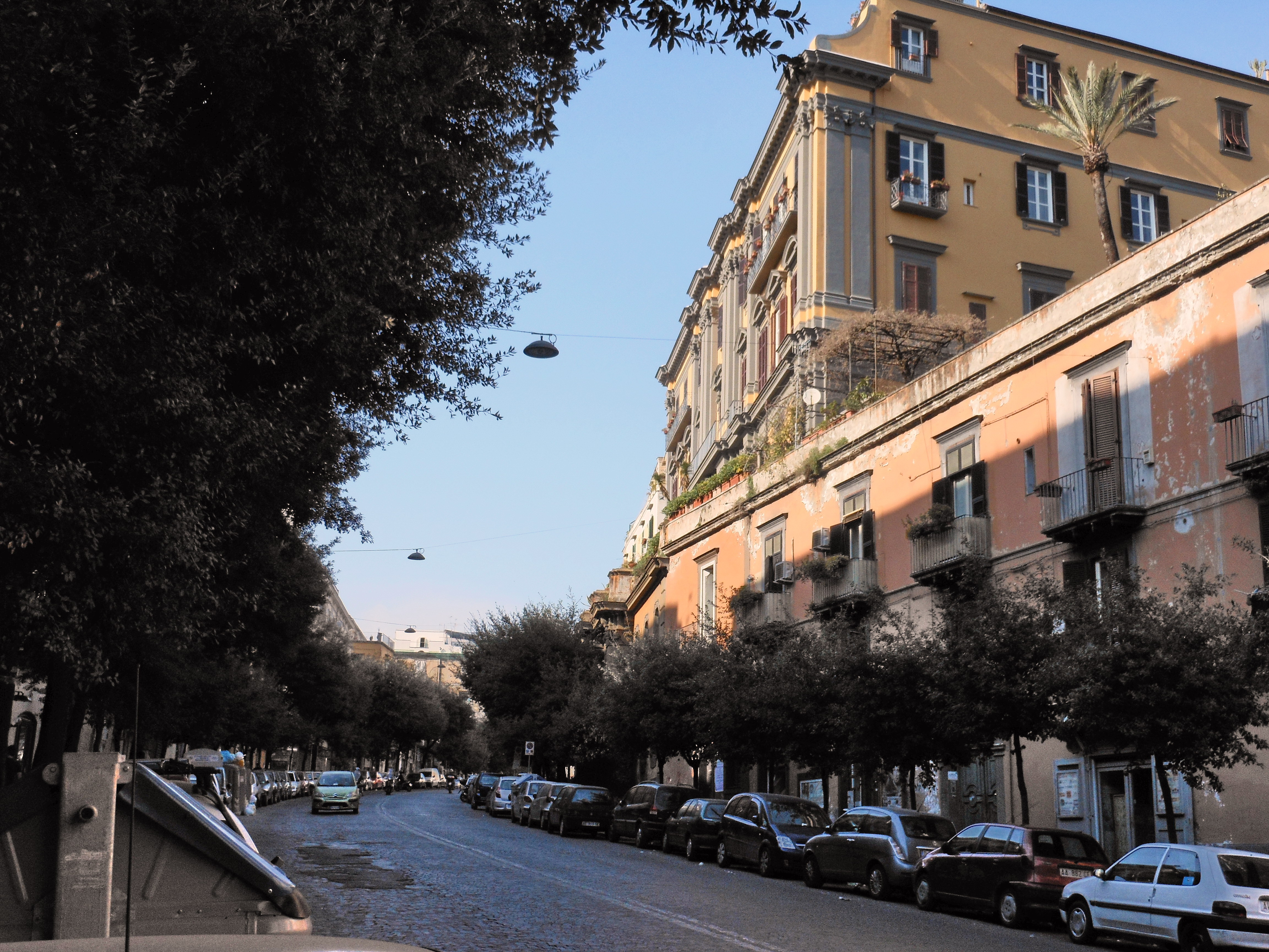 Via Santa Teresa all'altezza del palazzo Albertini di Cimiitle